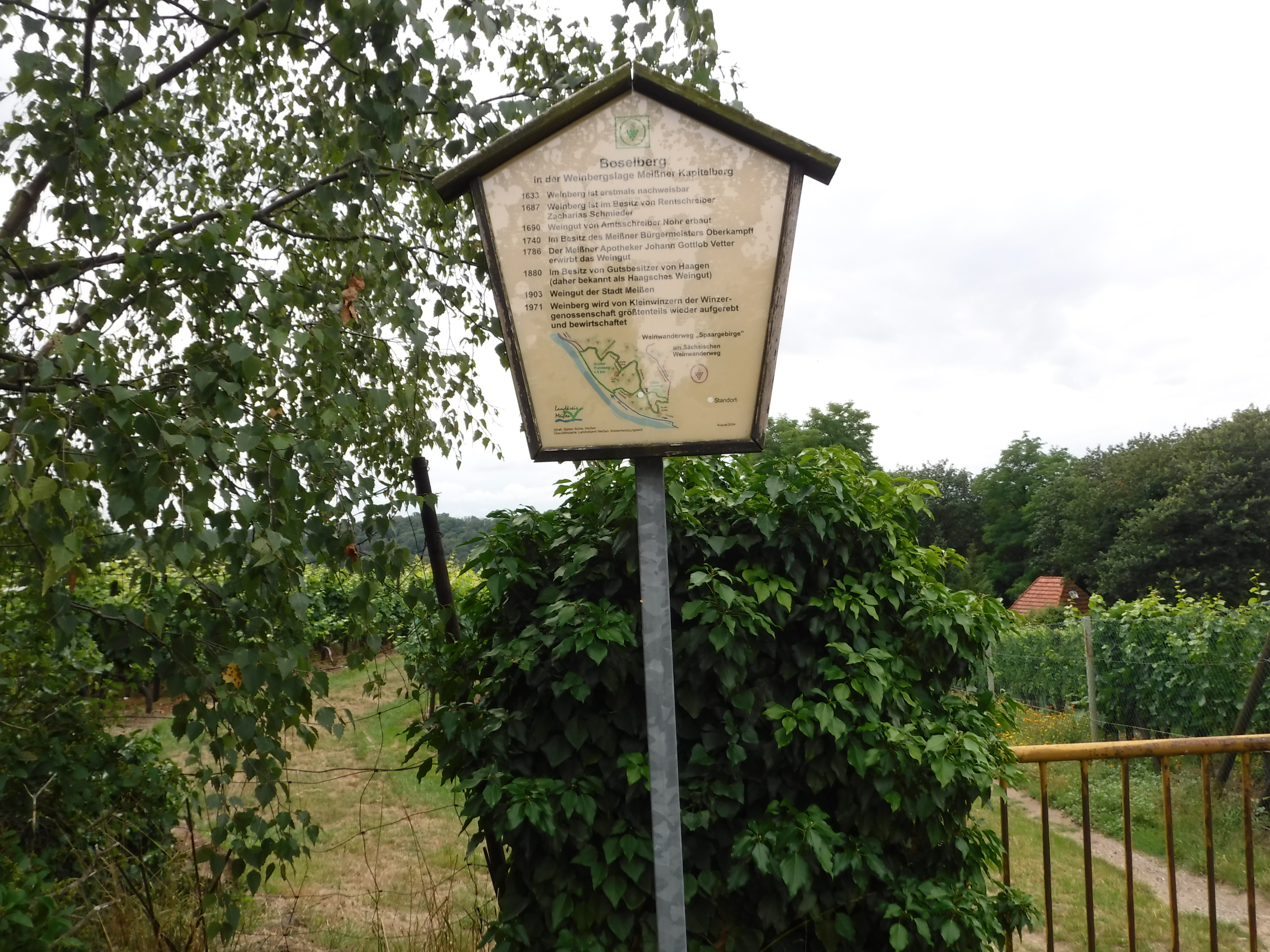 Informationstafel "Boselberg in der Weinbergslage Meißner Kapitelberg" im Landschaftsschutzgebiet "Bosel und Elbhänge nördlich Meißen"